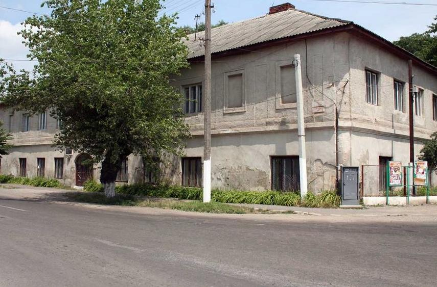 A tiszaújlaki sóház (Kárpátalja, Ukrajna)